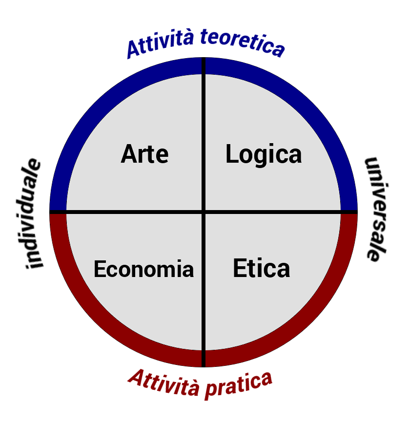 Schema che raffigura il «nesso dei distinti» nell'idealismo di Benedetto Croce, la cui struttura dialettica si basa sulle quattro forme della vita dello Spirito: Arte e Logica (attività teoretica), Economia ed Etica (attività pratica); Arte ed Economia hanno un contenuto individuale, Logica ed Etica attengono all'universale.[1]